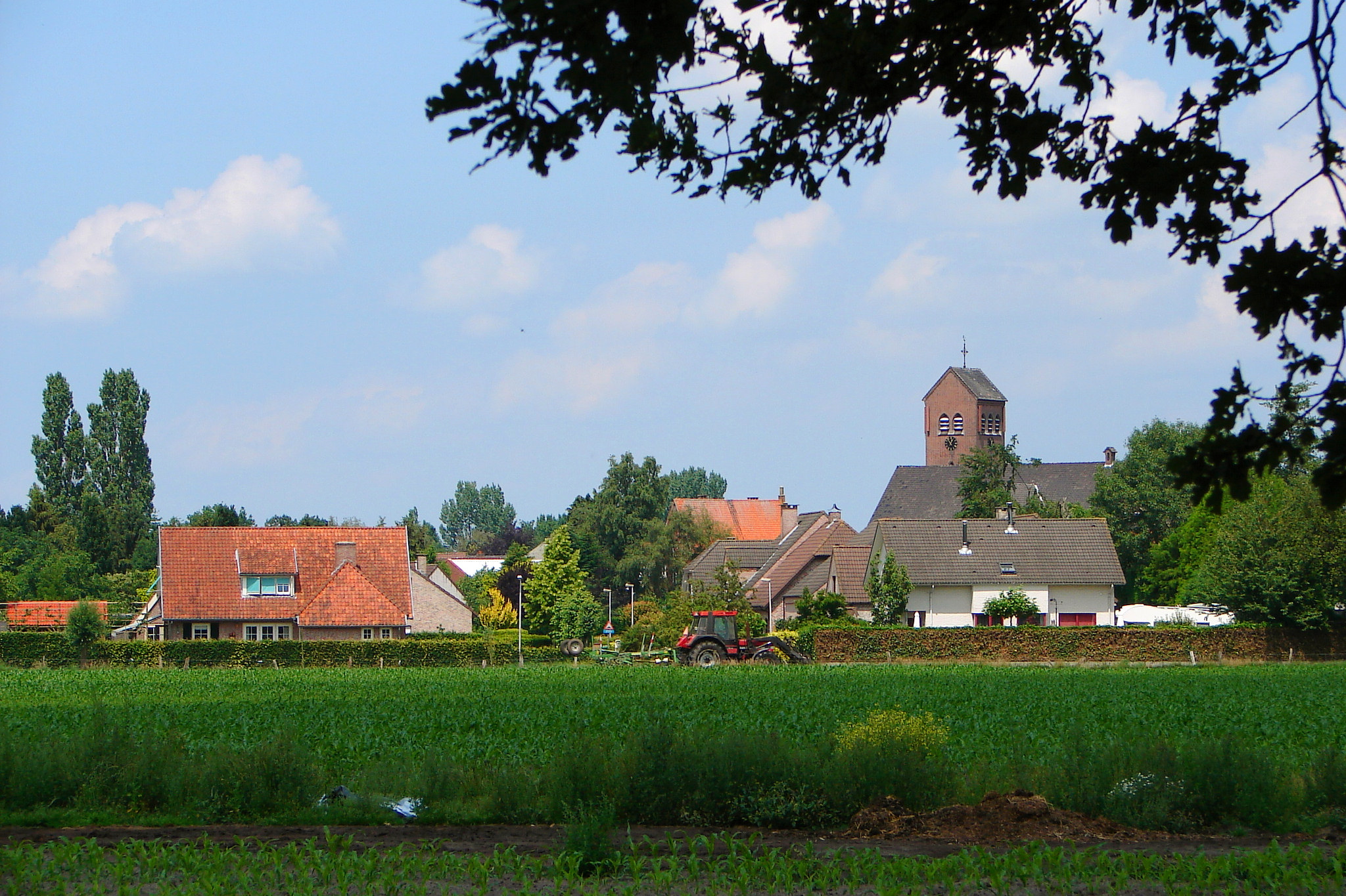 Horendonk (Essen municipality), Antwerp Province, Belgium